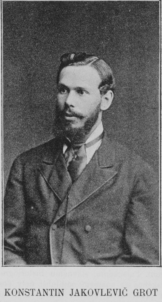 Portrait of Konstantin Yakovlevich Grot (Russian: Константин Яковлевич Грот 1853 - 1934), Russian slavist.